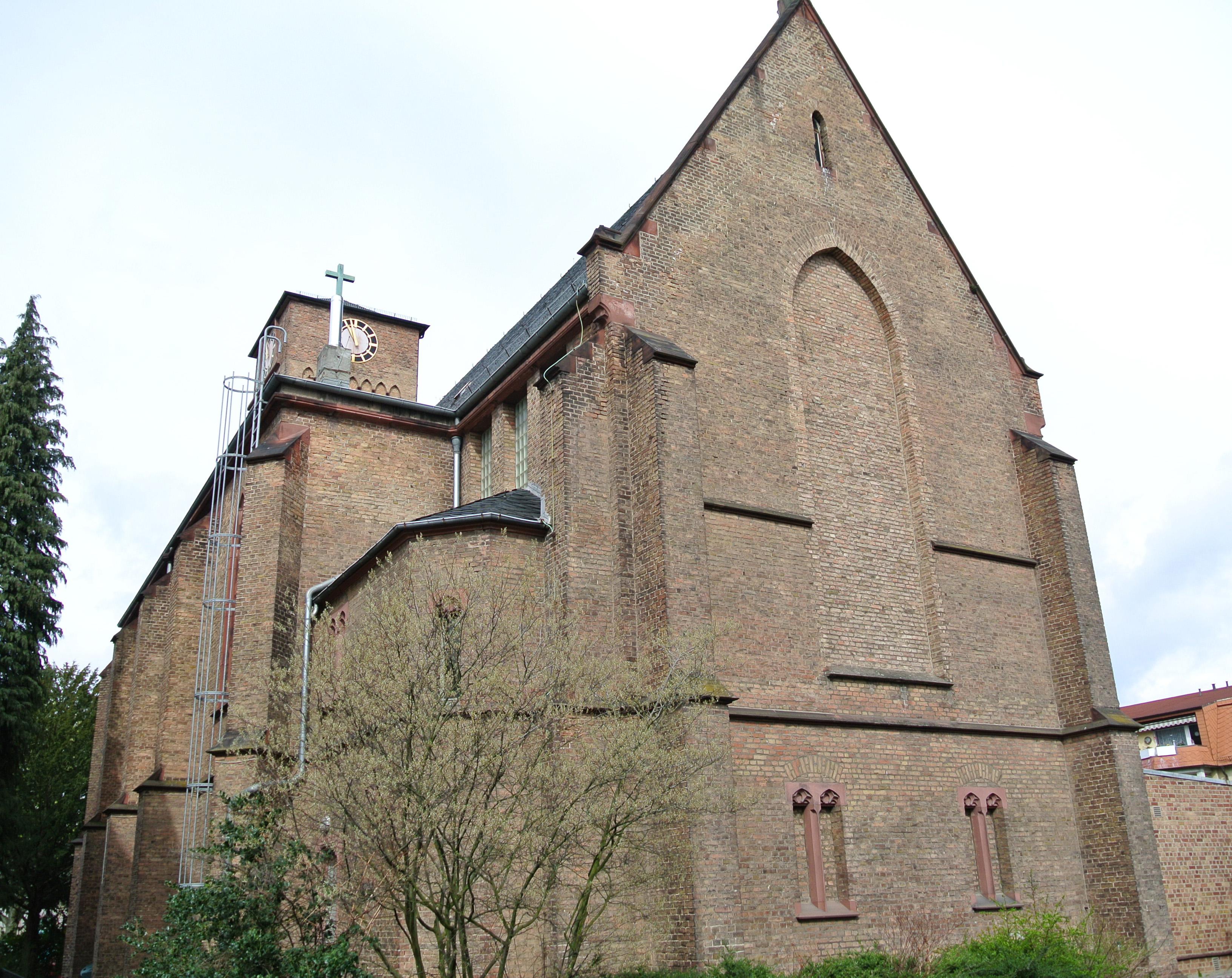 Evangelische St. Thomaskirche in Frankfurt-Heddernheim, Heddernheimer Kirchstraße 2; Baujahr 1898; Architekt Joseph Dormann; Neugotik; Baudenkmal; Südostseite